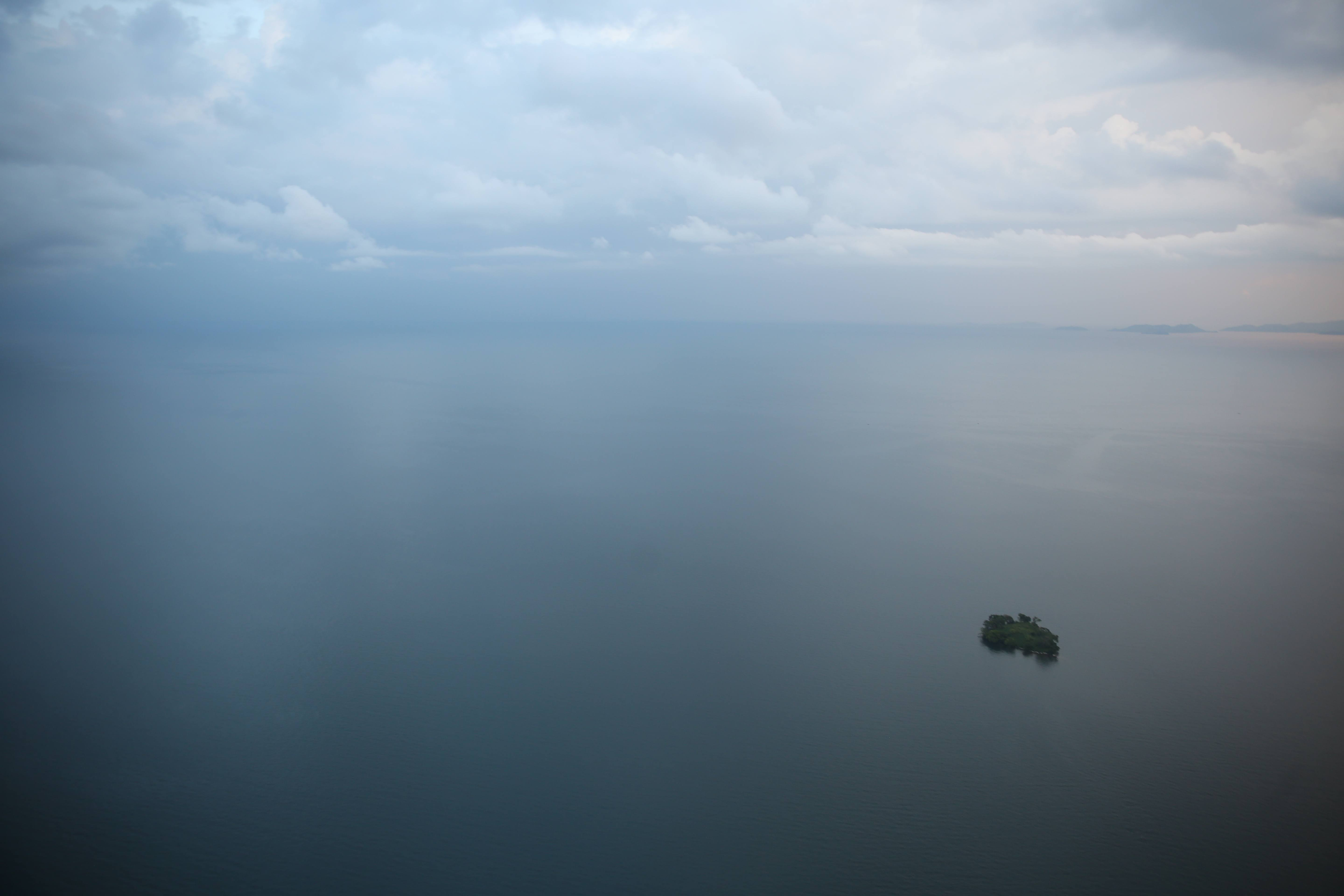 photo MONUSCO / Abel Kavanagh